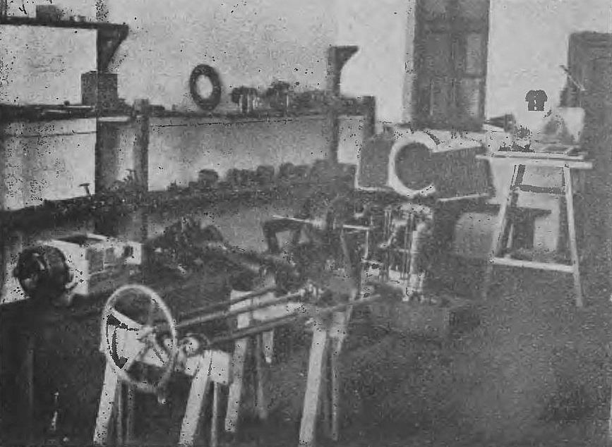 Modelaria 10 dyw. sam. (-1933)